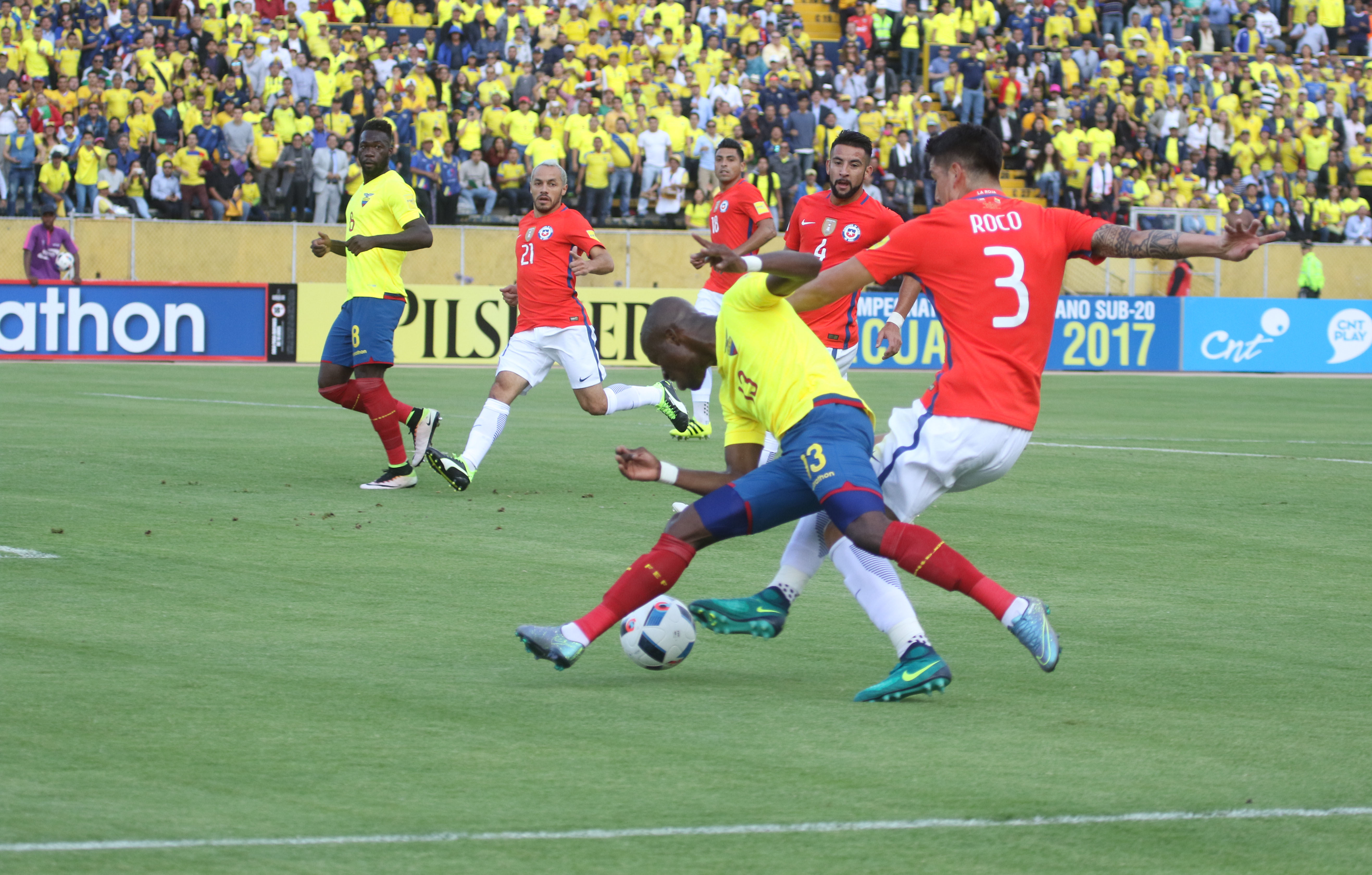 Quito, 6 oct (Andes).- Ecuador (amarillo) volvió a mostrar la imagen que lo llevó a ganar los primeros cuatro partidos en seguidilla de las Eliminatorias al Mundial Rusia 2018 y con algunas variantes se impuso por 3-0 a Chile en el estadio Olímpico Atahualpa de Quito.ANDES/Micaela Ayala V.